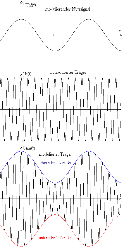 Amplitudenmodulation, stellt das modulierende Signal, das unmodulierte Trägersignal und das amplitudenmodulierte Signal inklusive Einhüllende dar (m=0.5)